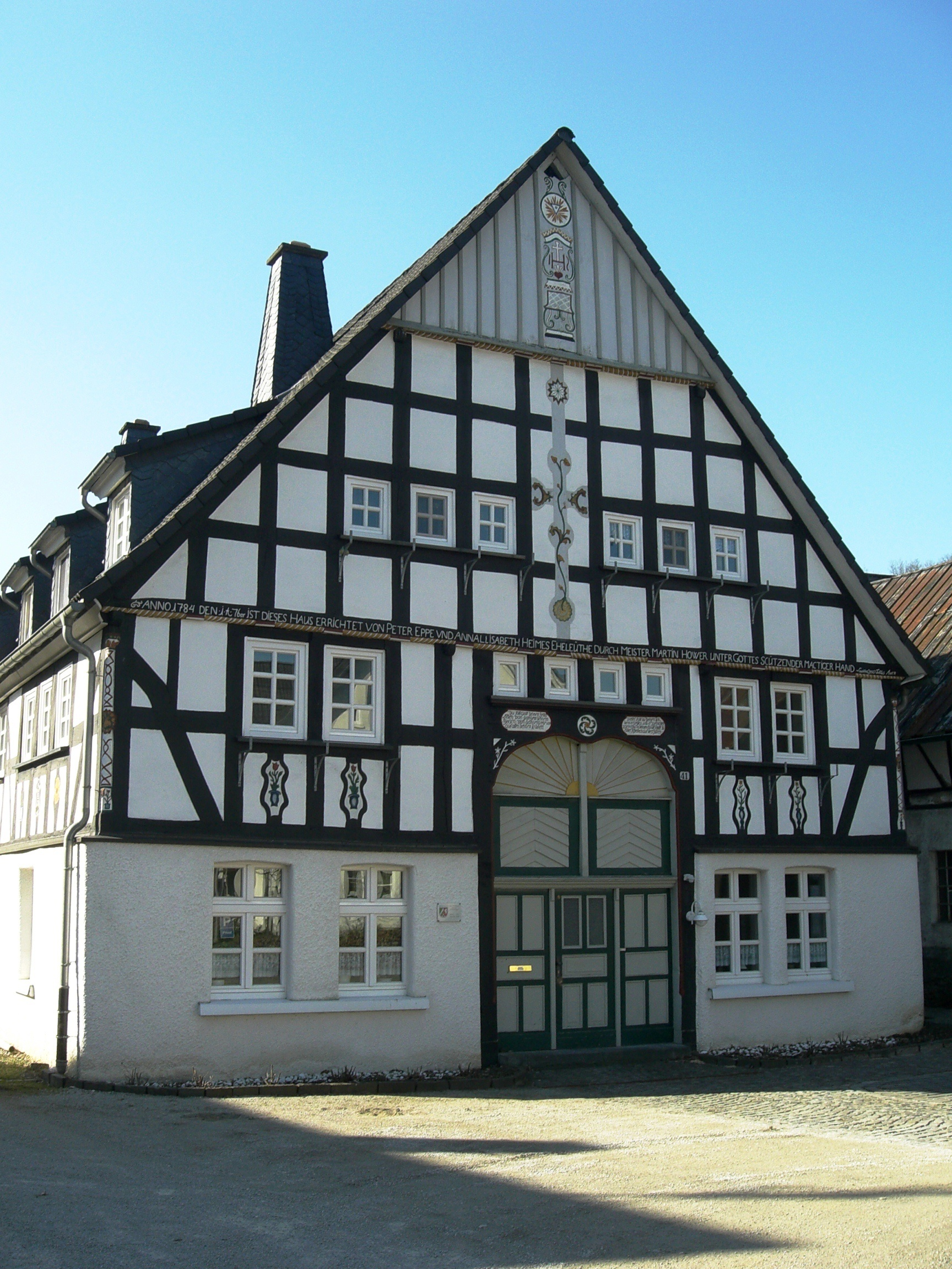 Hofhaus unter Denkmalschutz, Bauj. um 1784